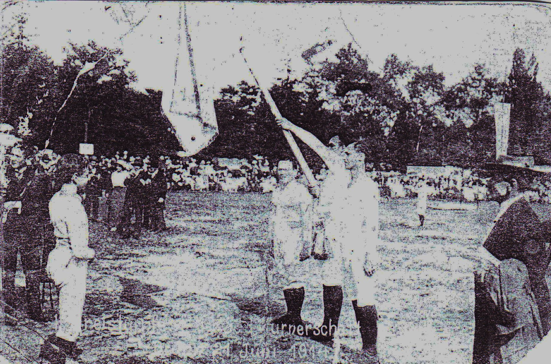 JÜDISCHE TURNVEREIN תחרות